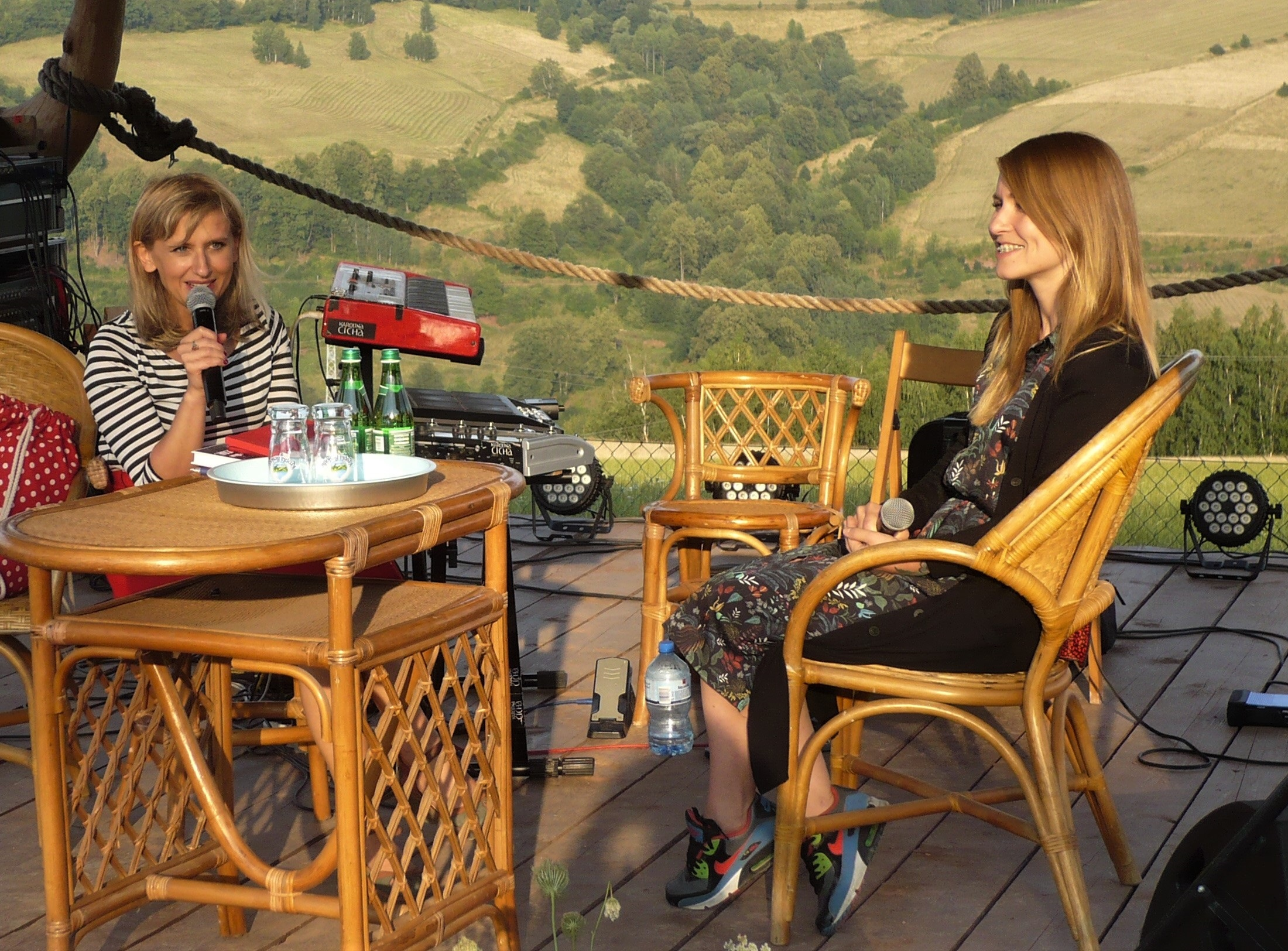 Justyna Sobolewska, Dorota Masłowska, Festiwal Góry Literatury, 2018